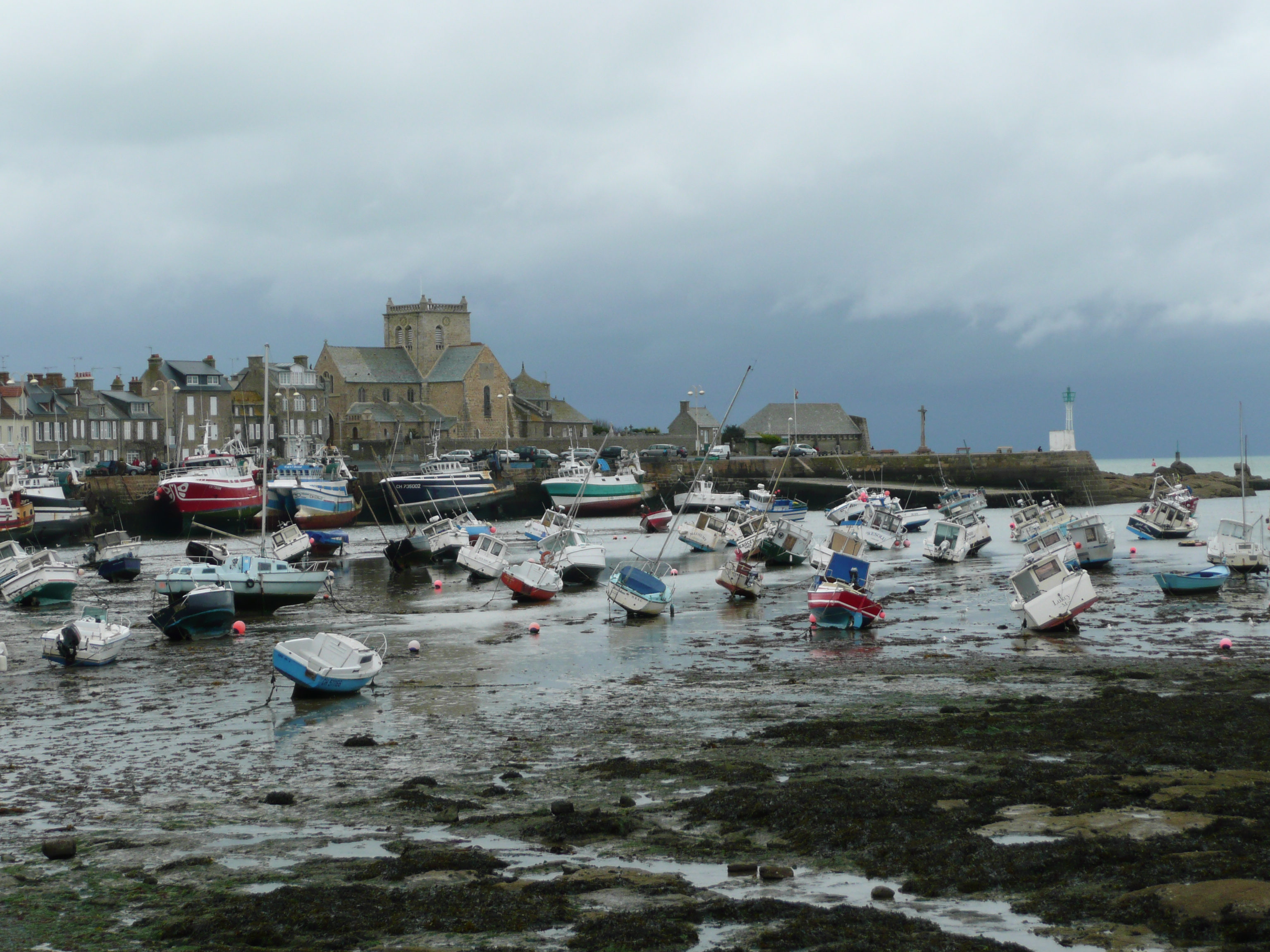 Le port après l'orage